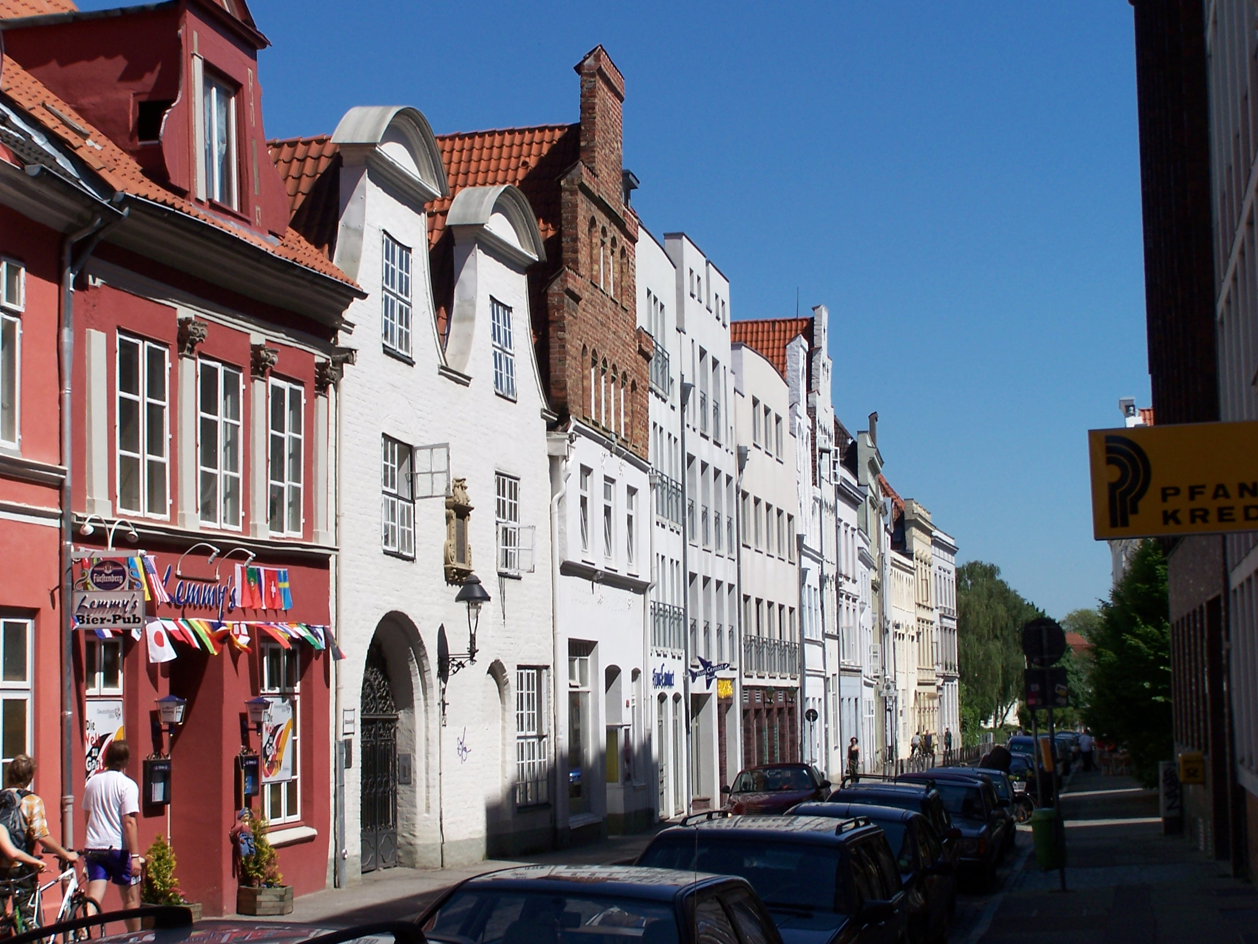 Dr.-Julius-Leber-Straße in Lübeck